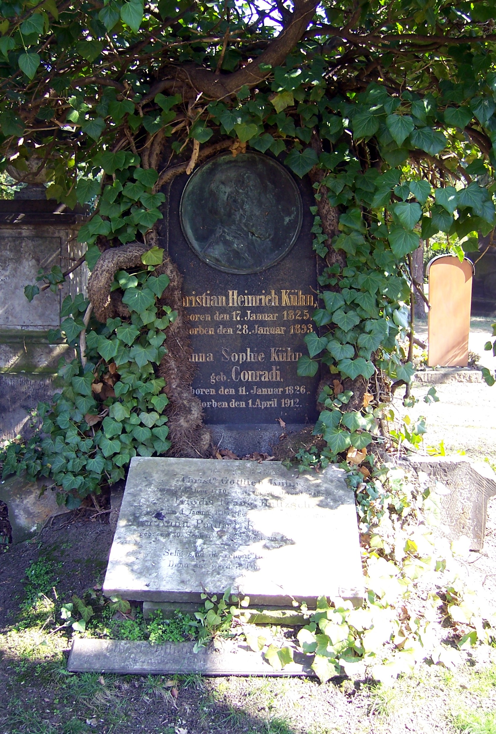 Grab des deutschen Bildhauers Christian Gottlieb Kühn (liegende Grabplatte) und seines Sohnes auf dem Trinitatisfriedhof in Dresden.